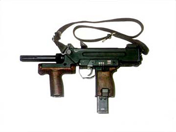 略称：M9 愛称：エムナイン [口径]9.0mm [全長]399mm [銃身長]120mm [重量]2.8kg [作動方式]単純吹き戻し式 [弾倉]25発入り [製作]ミネベア 空挺部隊の指揮官、部隊装備火器操作手などの自衛戦闘用。